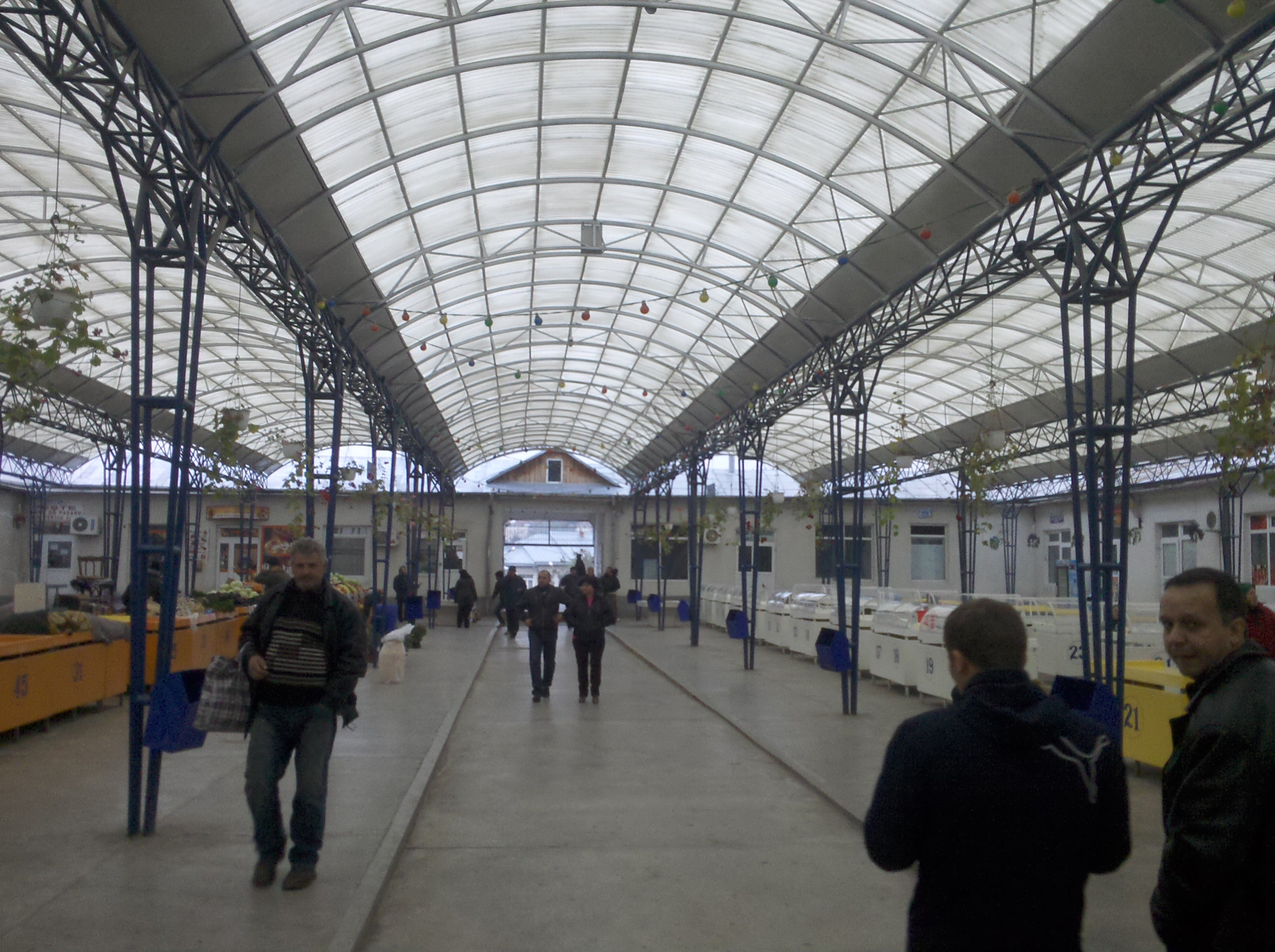 el mercat central de Dorohoi